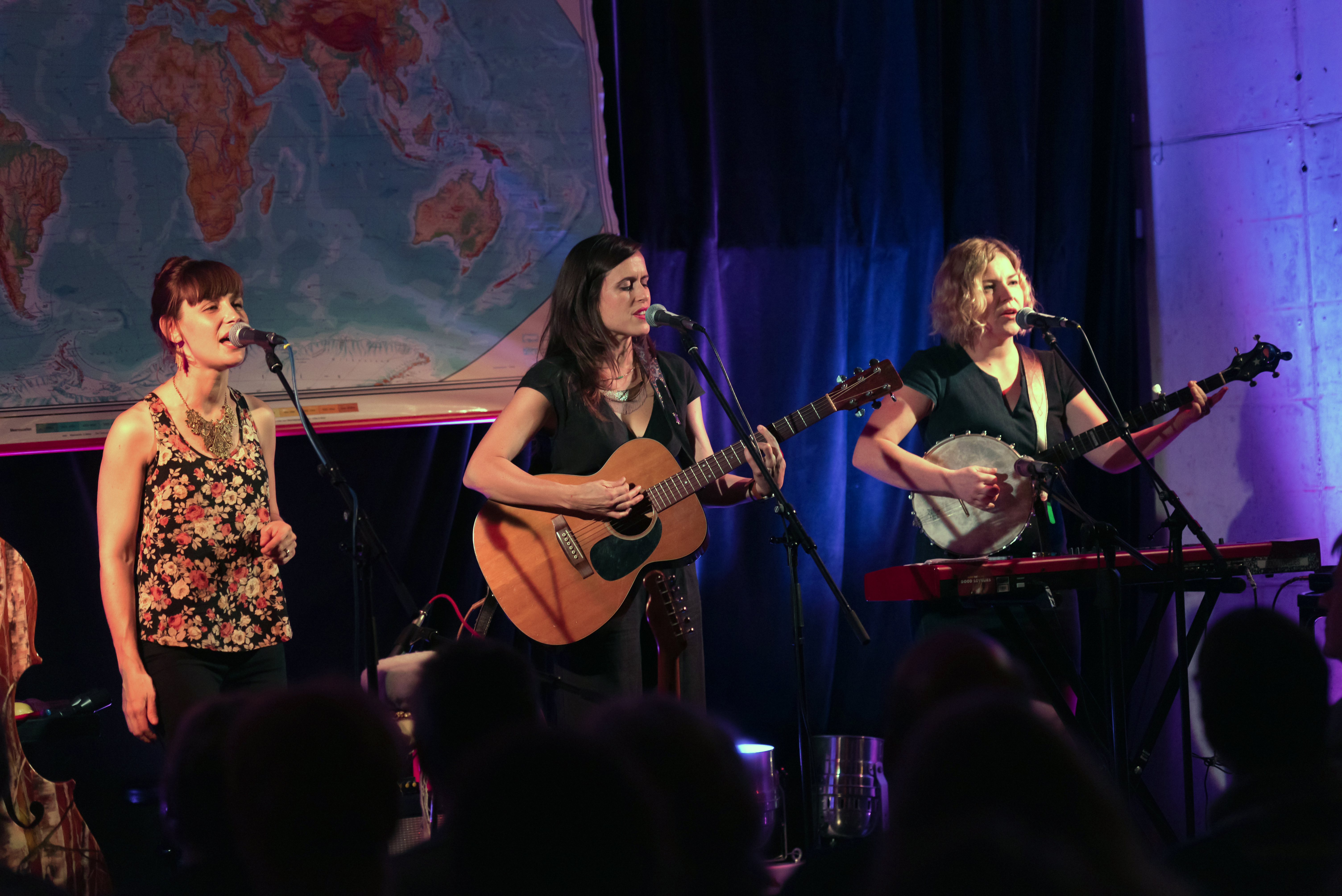 Good Lovelies bei Lottes Musiknacht im Haus 13 in Elmshorn